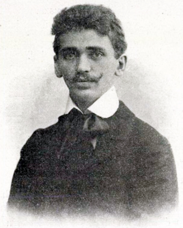 Harsányi Kálmán magyar költő, író, drámaíró, színikritikus